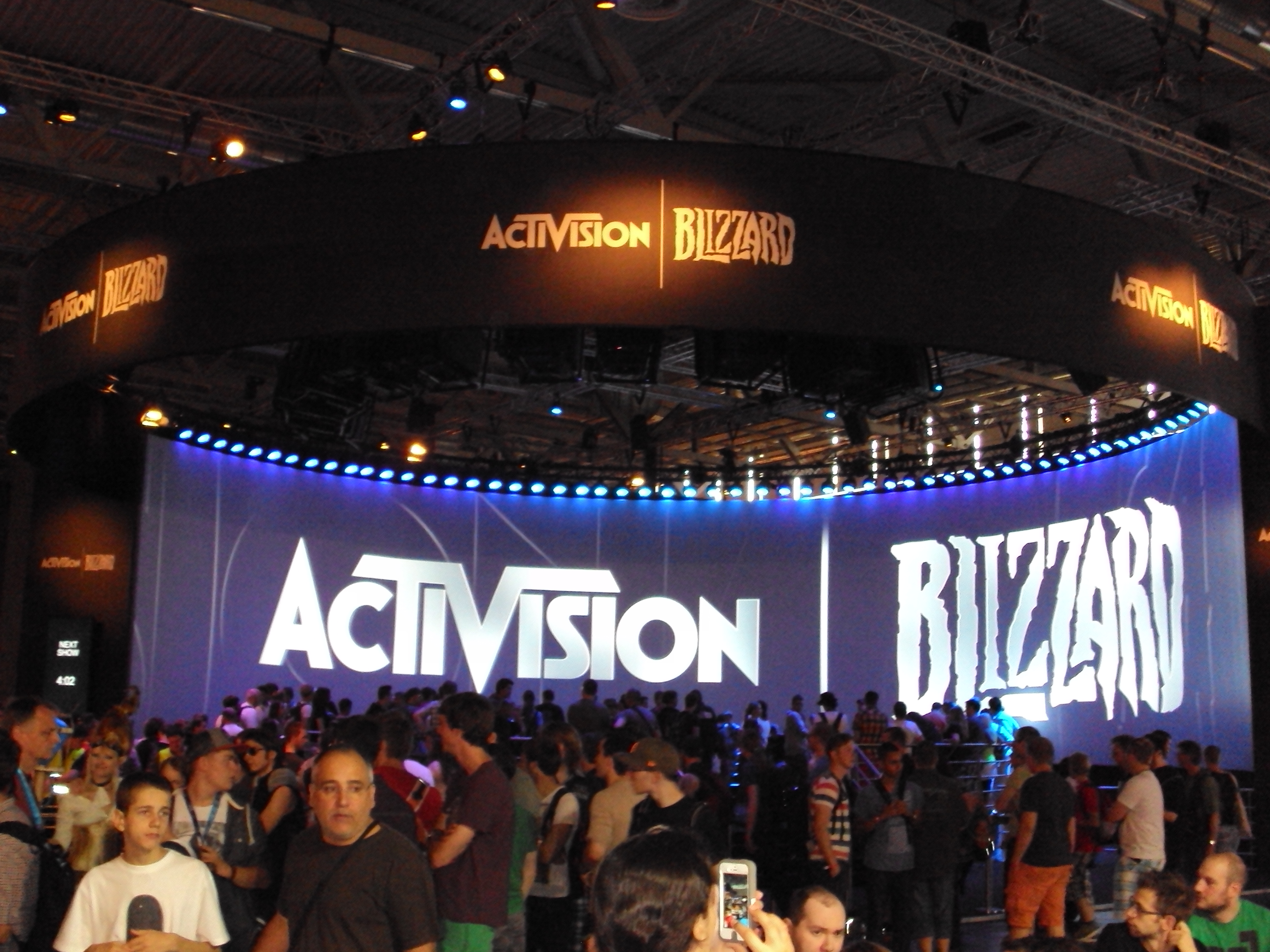 Stand van Activision op Gamescom 2013